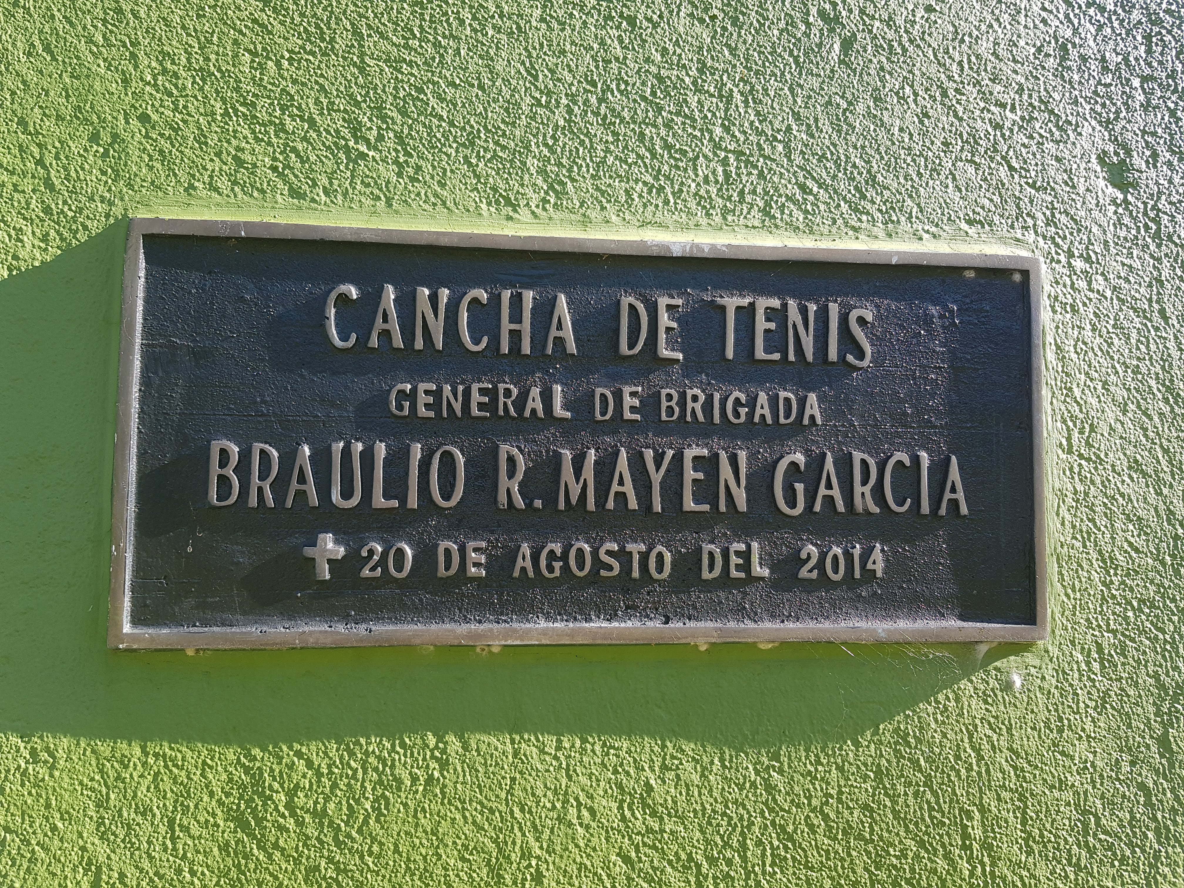 Placa ubicada en las canchas de Tennis en el Comando Superior de Educación del Ejército de Guatemala (cosede), en honor al General Mayen García.